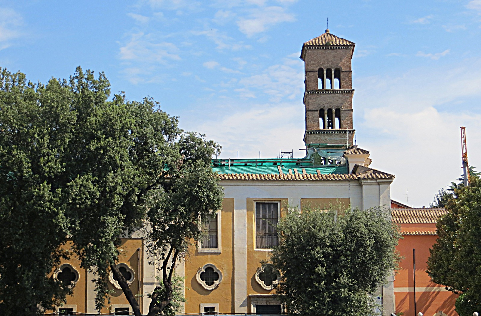 Chiesa di San Sisto Vecchio